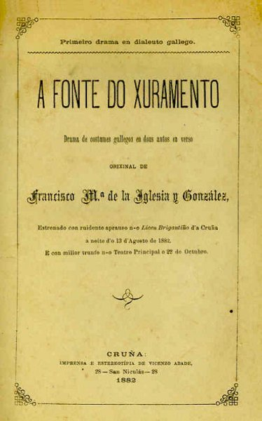 Portada da primeira edición da obra A fonte do xuramento, de Francisco María de la Iglesia, co seguinte texto: Primeiro drama en dialeuto gallego.A FONTE DO XURAMENTODrama de costumes gallegos en dous autos en verso.ORIXINAL DEFrancisco María de la Iglesia y González,Estrenado con ruidente aprauso n·o Liceu Brigantiño d'a Coruñaa noite d'o 13 d'agosto de 1882E con millor trunfo n·o Teatro principal o 22 de OctubroCRUÑA:IMPRENTA E ESTEREOTÍPIA DE VICENZO ABADE,28 - San Nicolás - 281882